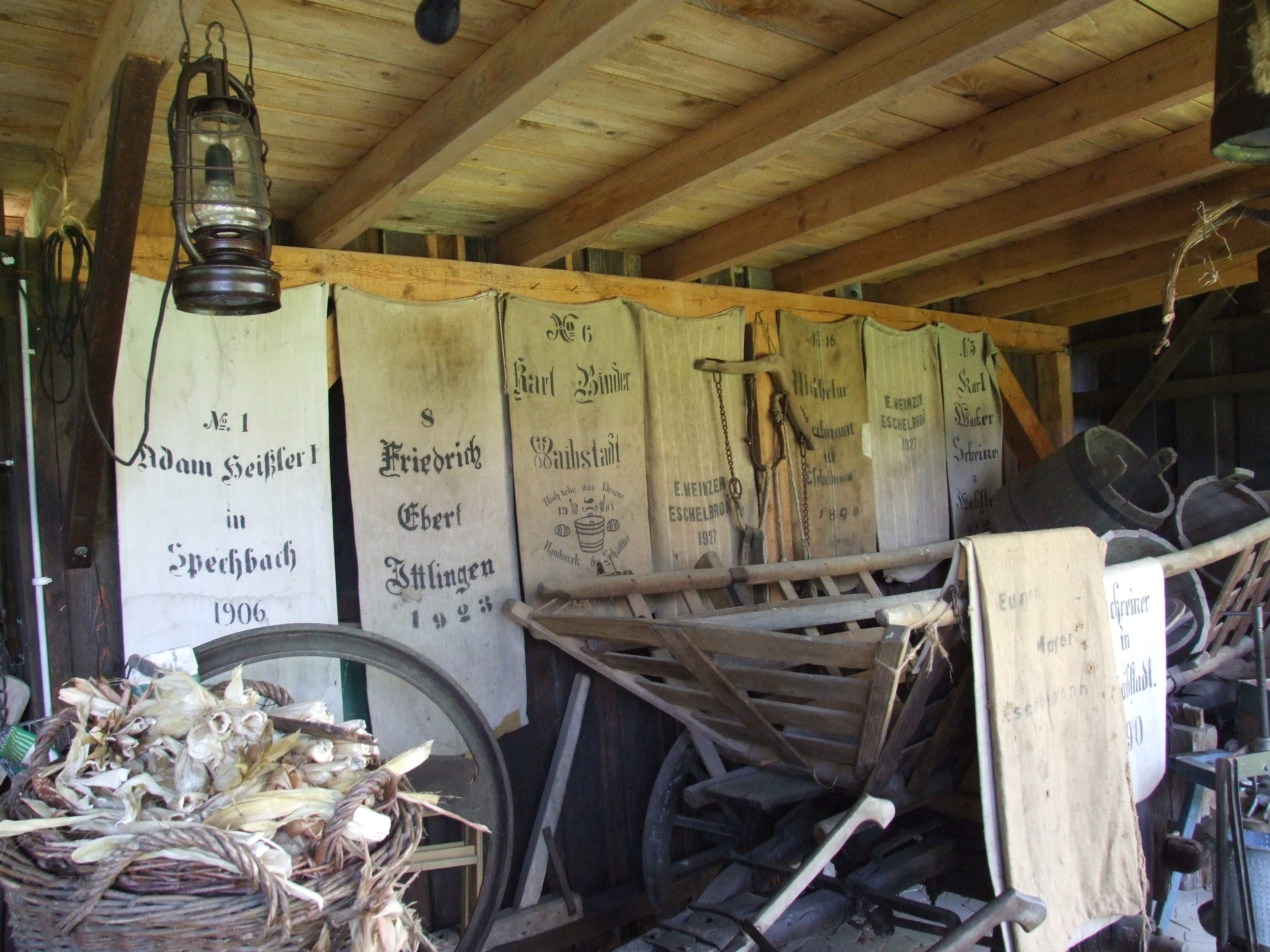 Freilichtmuseum "Sellemols Agger" in Eschelbronn